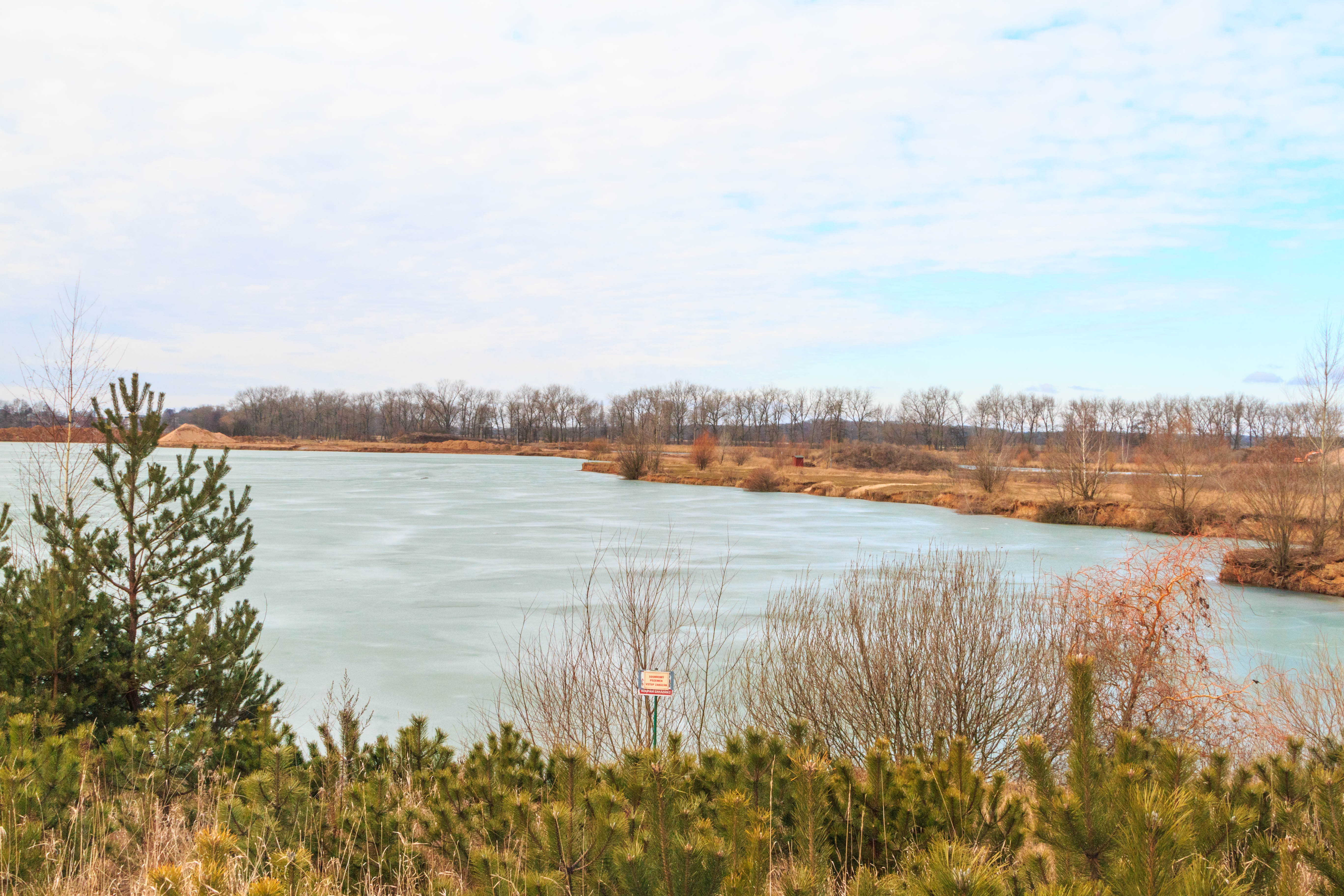 Písníky u Roudnice Project: Vodstvo.